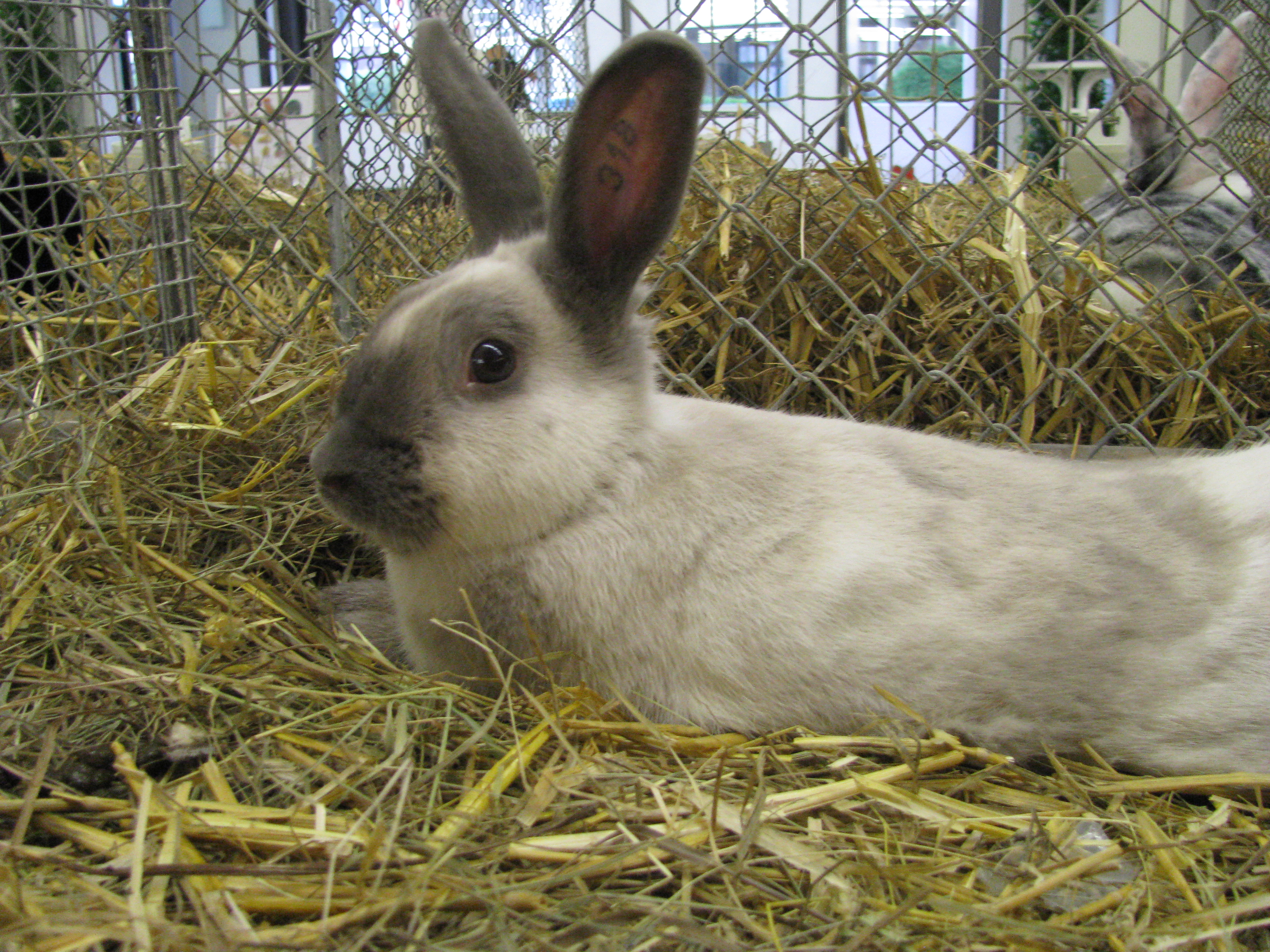 Siamesen-Kaninchen